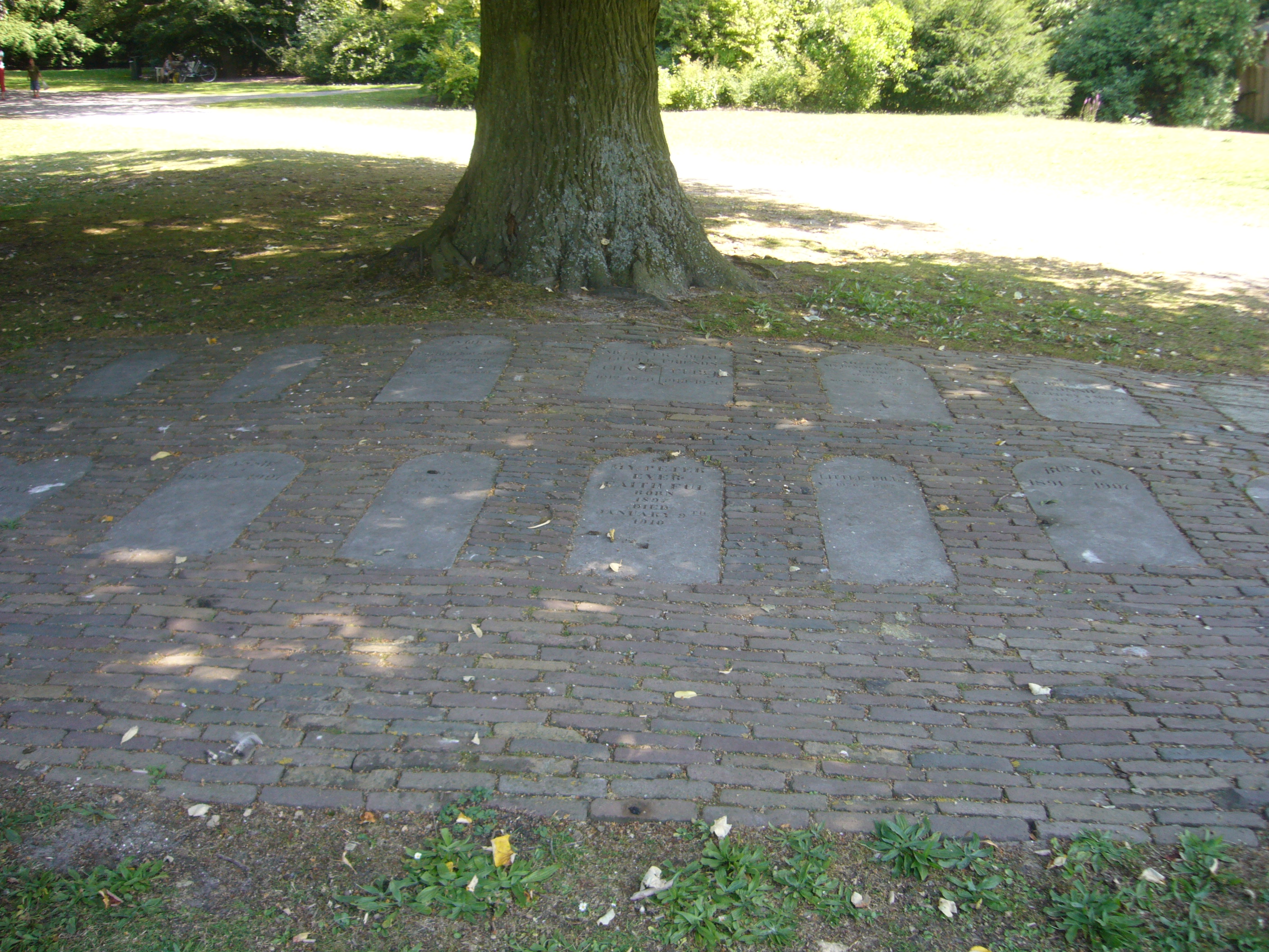 Landgoed Clingendael, hondergraven onder de linde